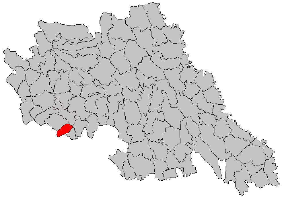 Categorie:Hărţi ale judeţului Iaşi